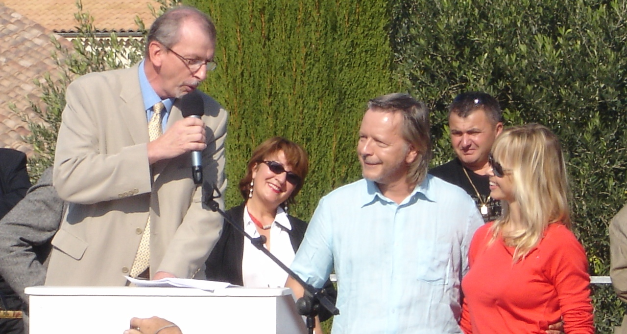 M. le Sous-Prefet de Nyons, Etienne Stock, remercie Renaud et son epouse pour leur don genereux